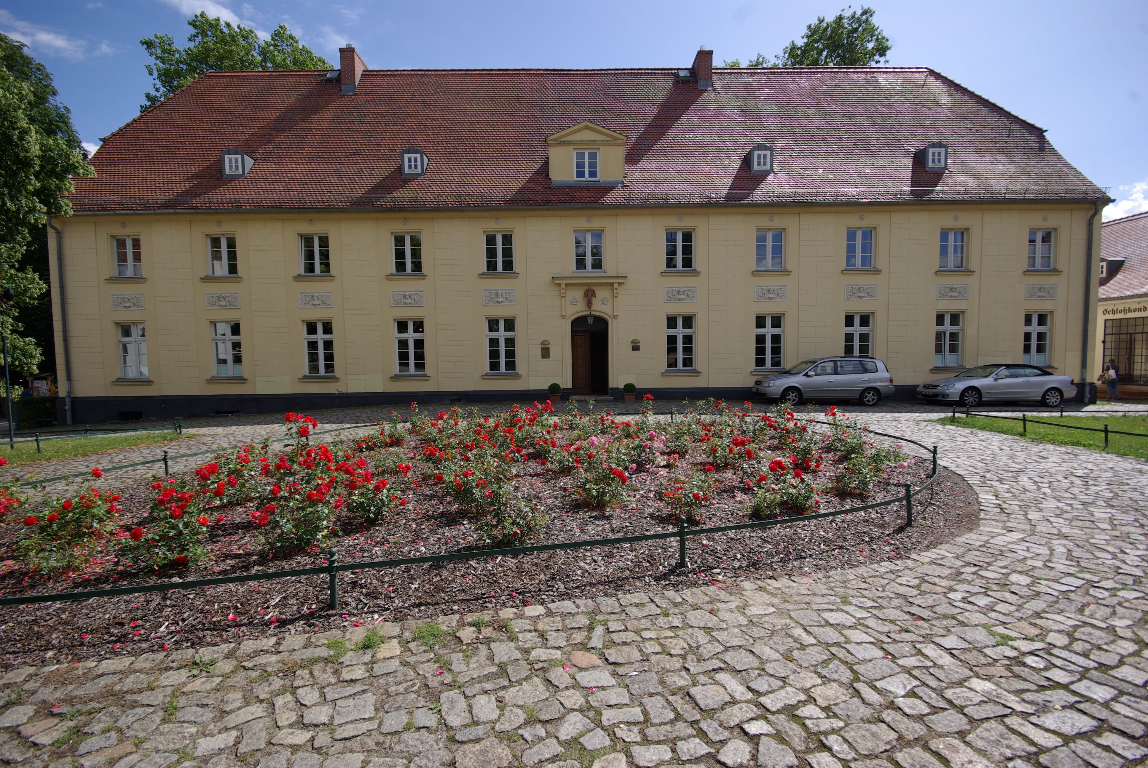 Großbeeren, Ortsteil Diedersdorf. Das Gutshaus Diedersdorf ist heute ein Hotel und steht unter Denkmalschutz.